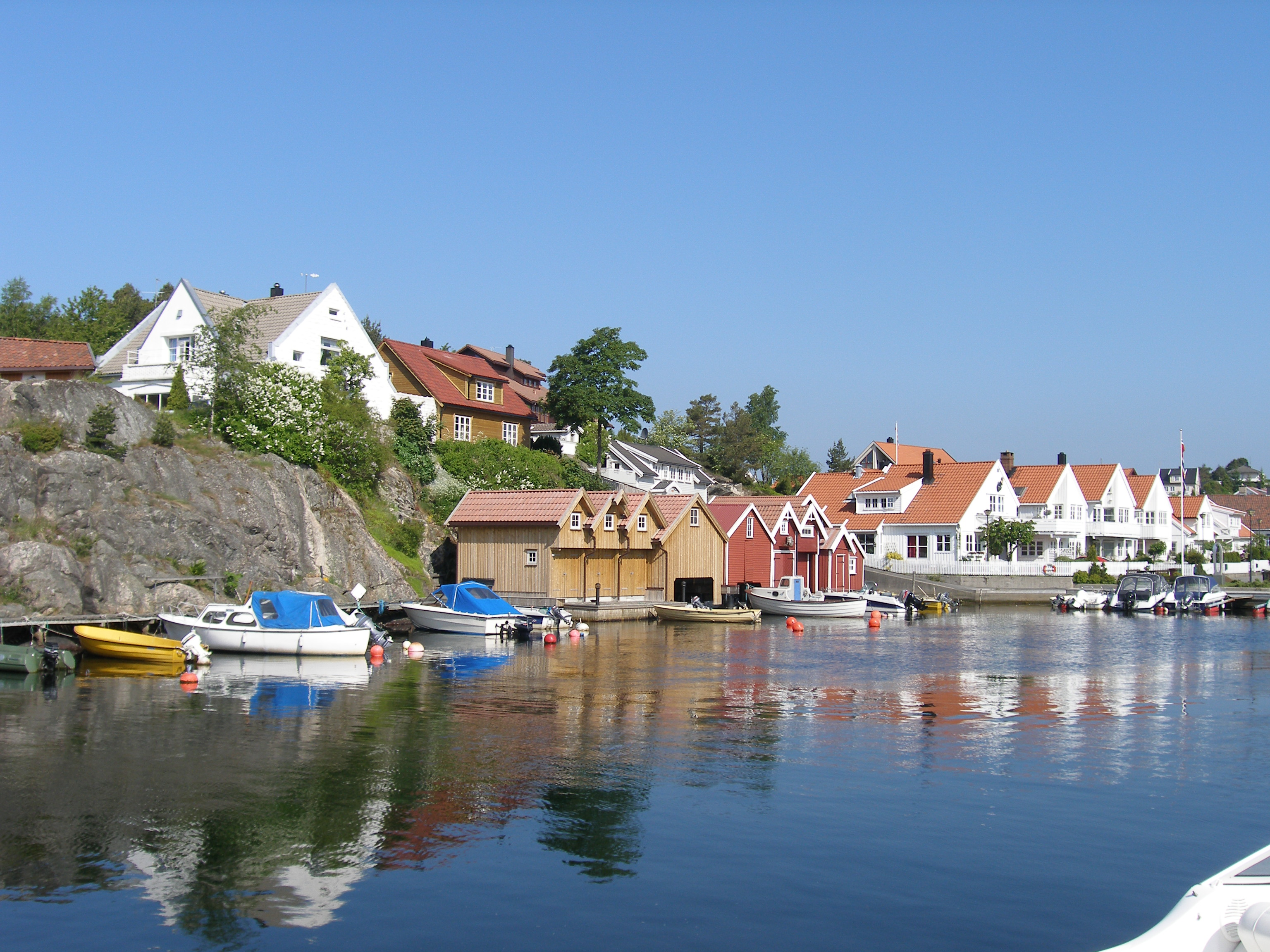 Høllen havn